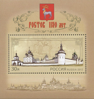 Почтовая марка России